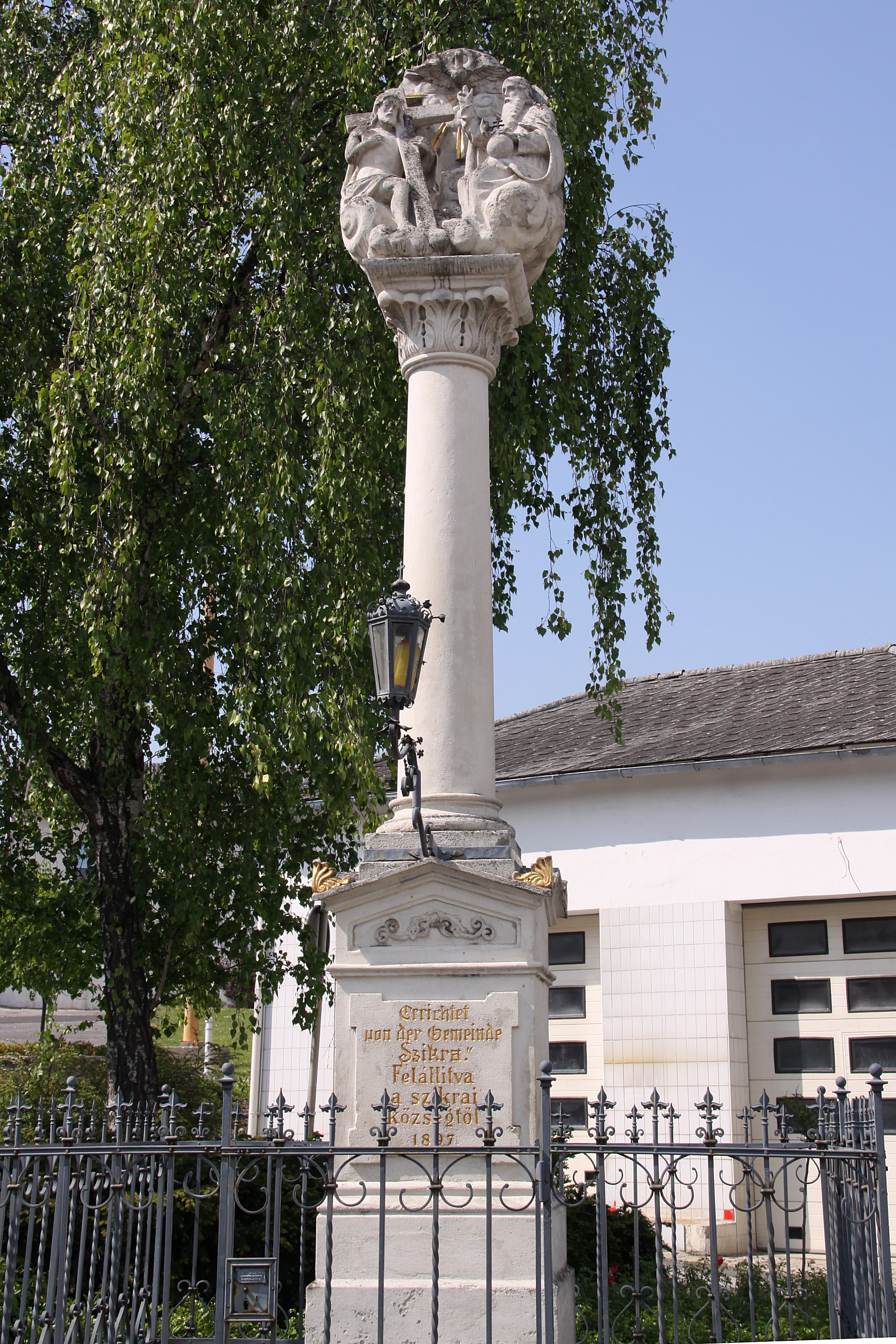 Sieggraben - Dreifaltigkeitssäule (errichtet 1897)